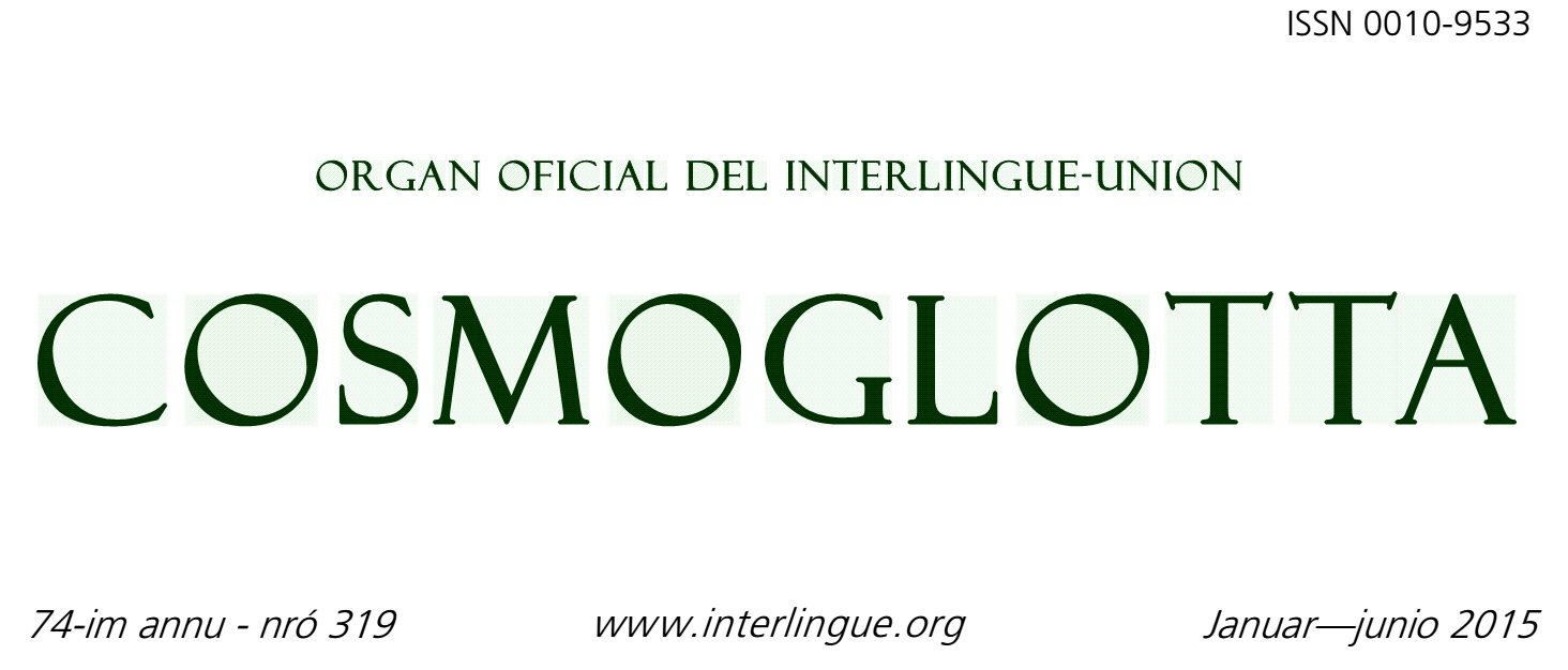 Логотип журнала на языке окциденталь "Космоглотта"